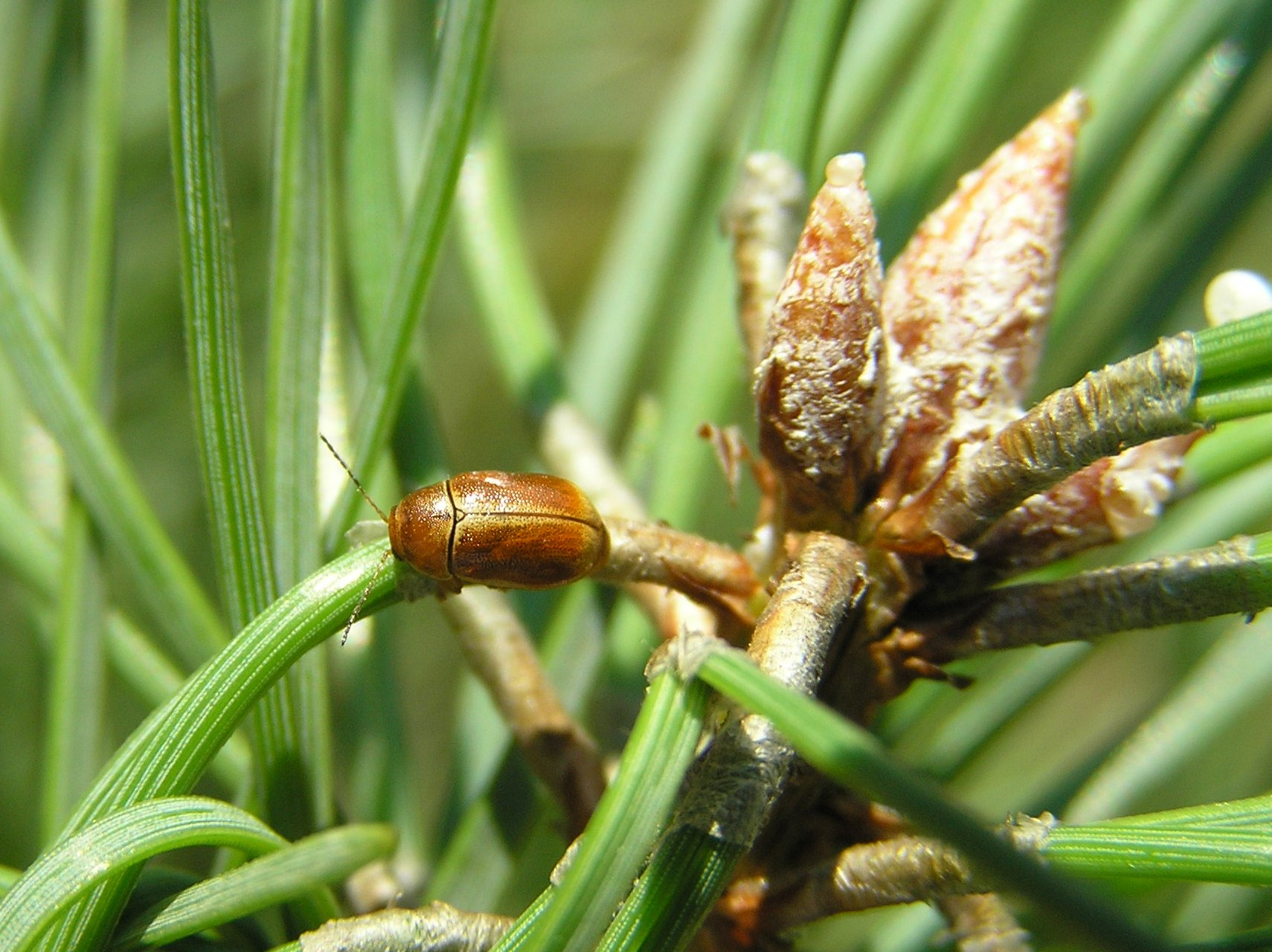 Cryptocephalus pini, zmróżka sosnowa, Polska